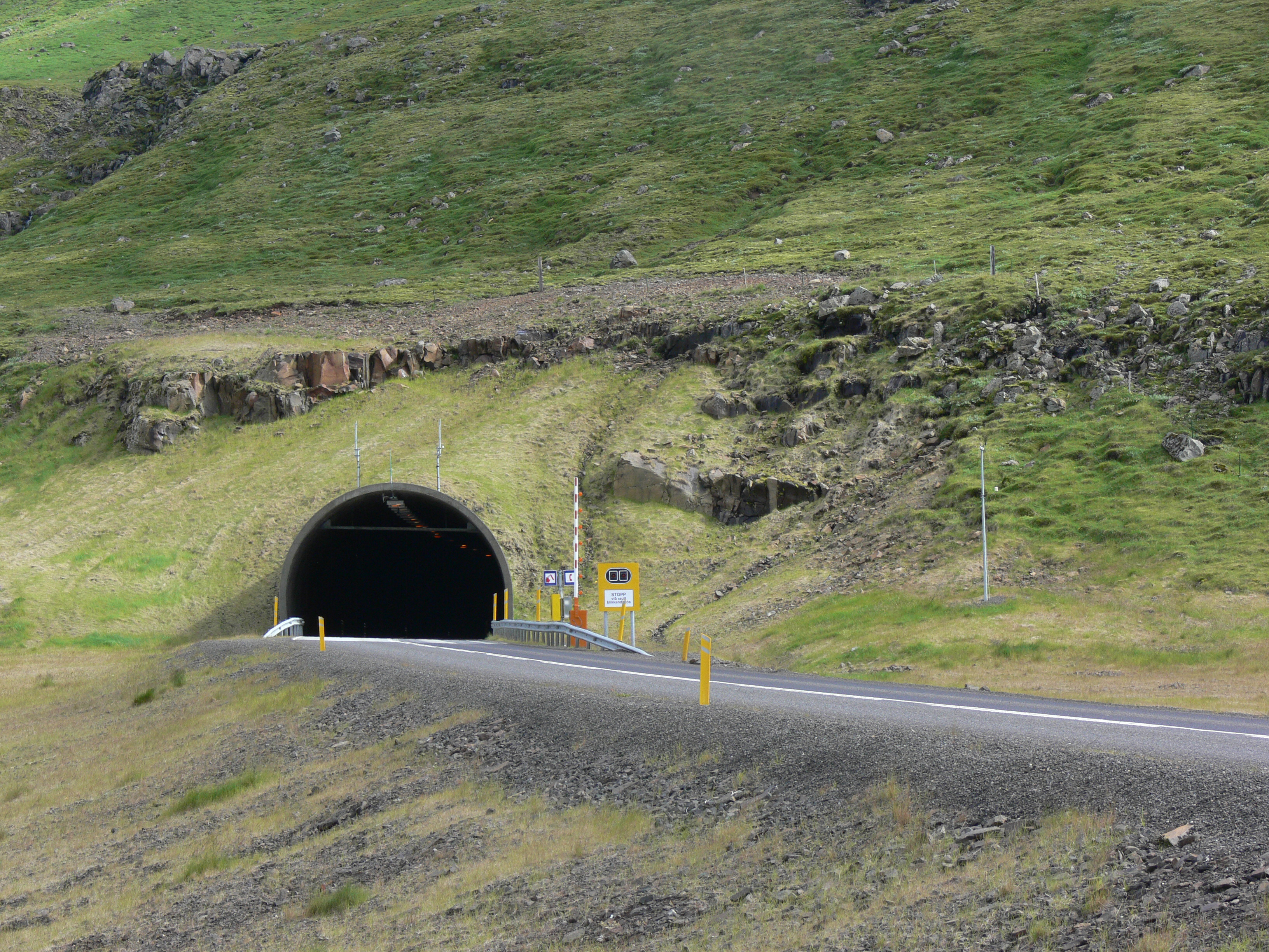 Tunnel bei Dalir, der Fáskrúðsfjörður mit Reyðarfjörður verbindet.